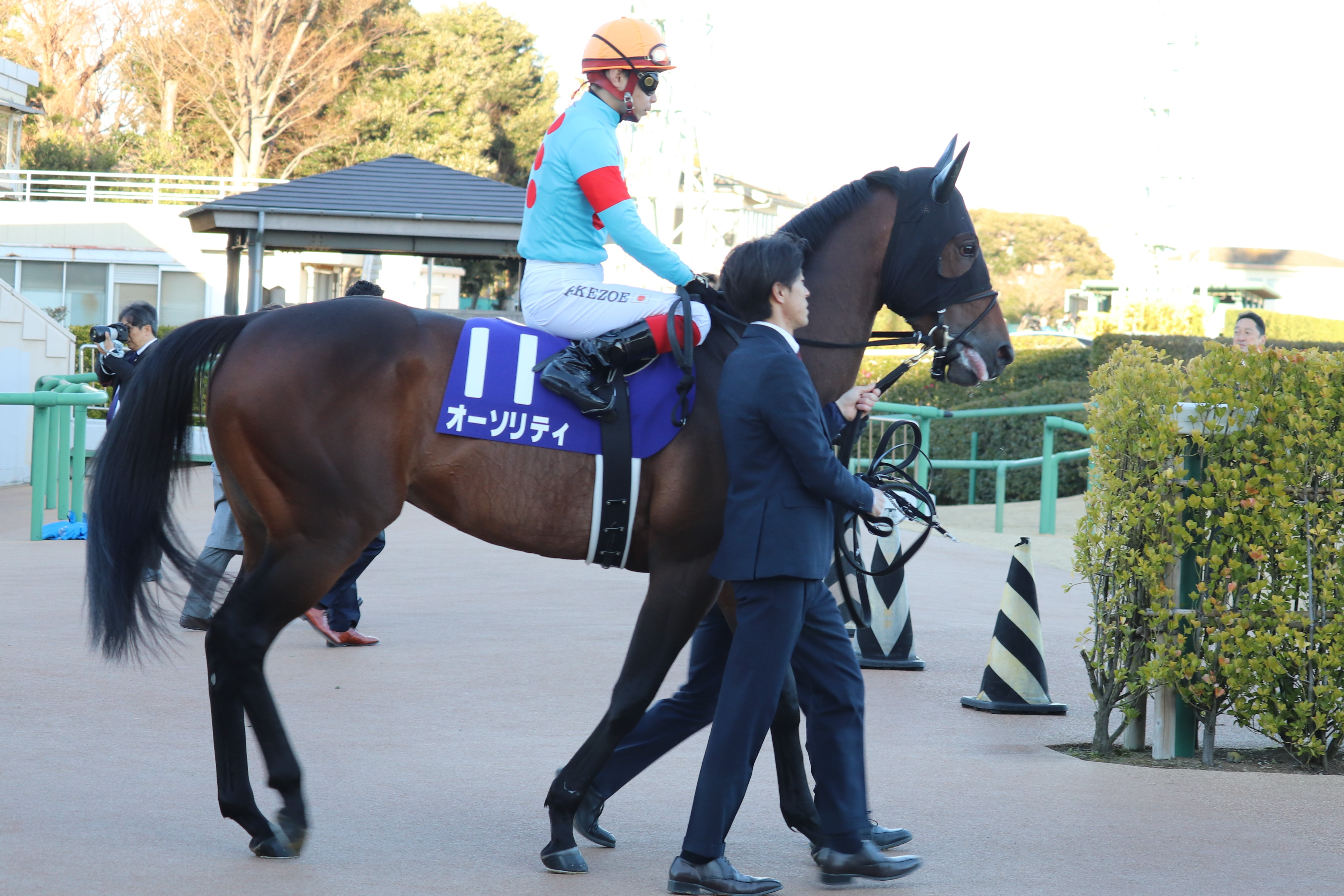 2019年のホープフルステークス、本馬場入場をするオーソリティ